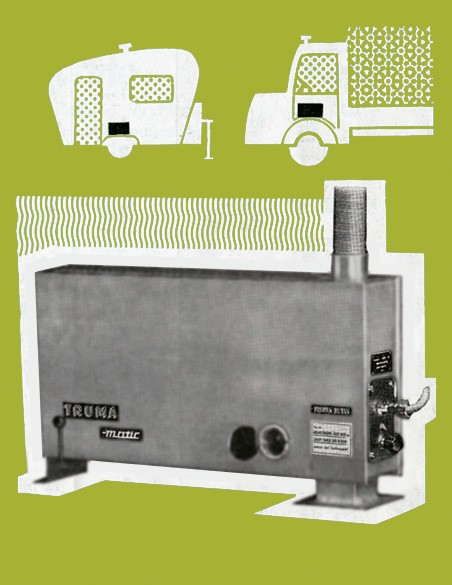 Die erste Wohnwagen-Heizung Truma-matic von der Firma Truma aus dem Jahre 1961